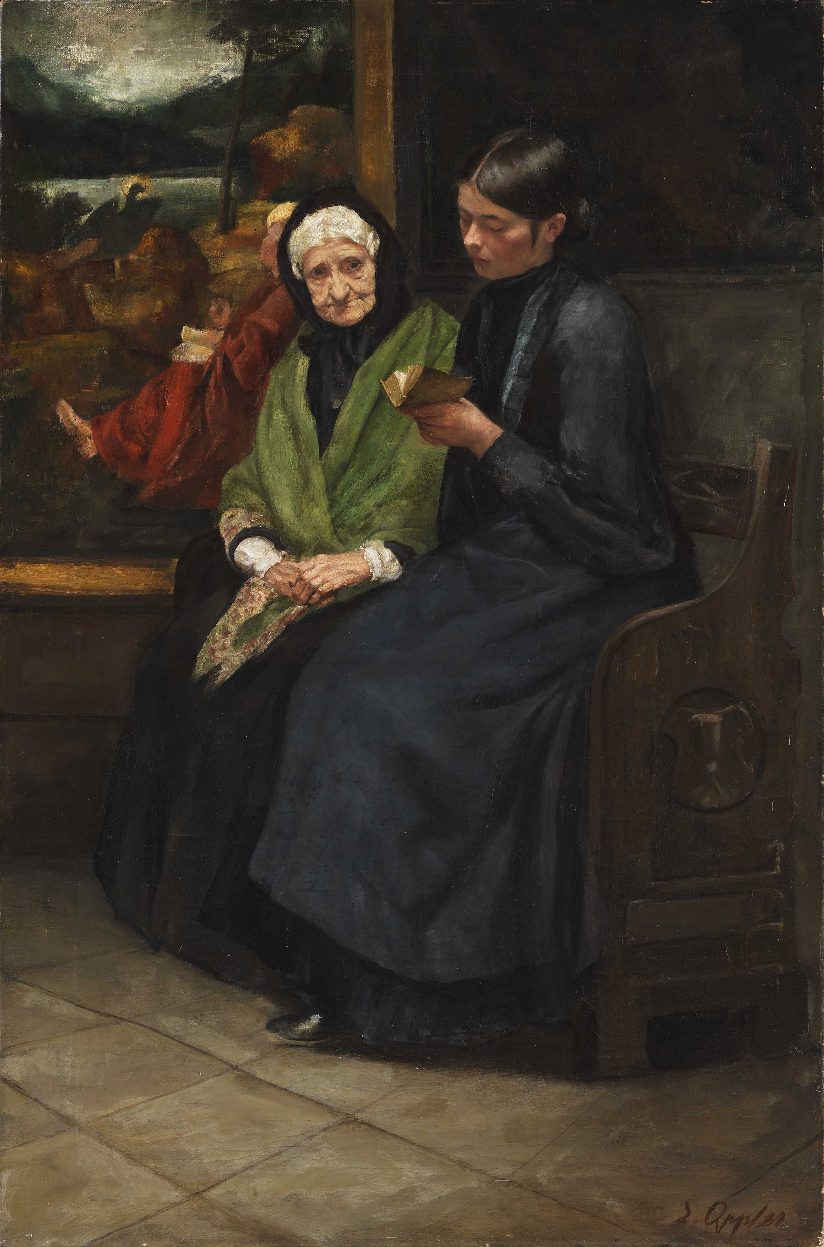 Praying